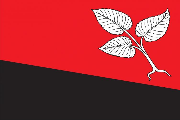 vlajka Staré Město pod Landštejnem